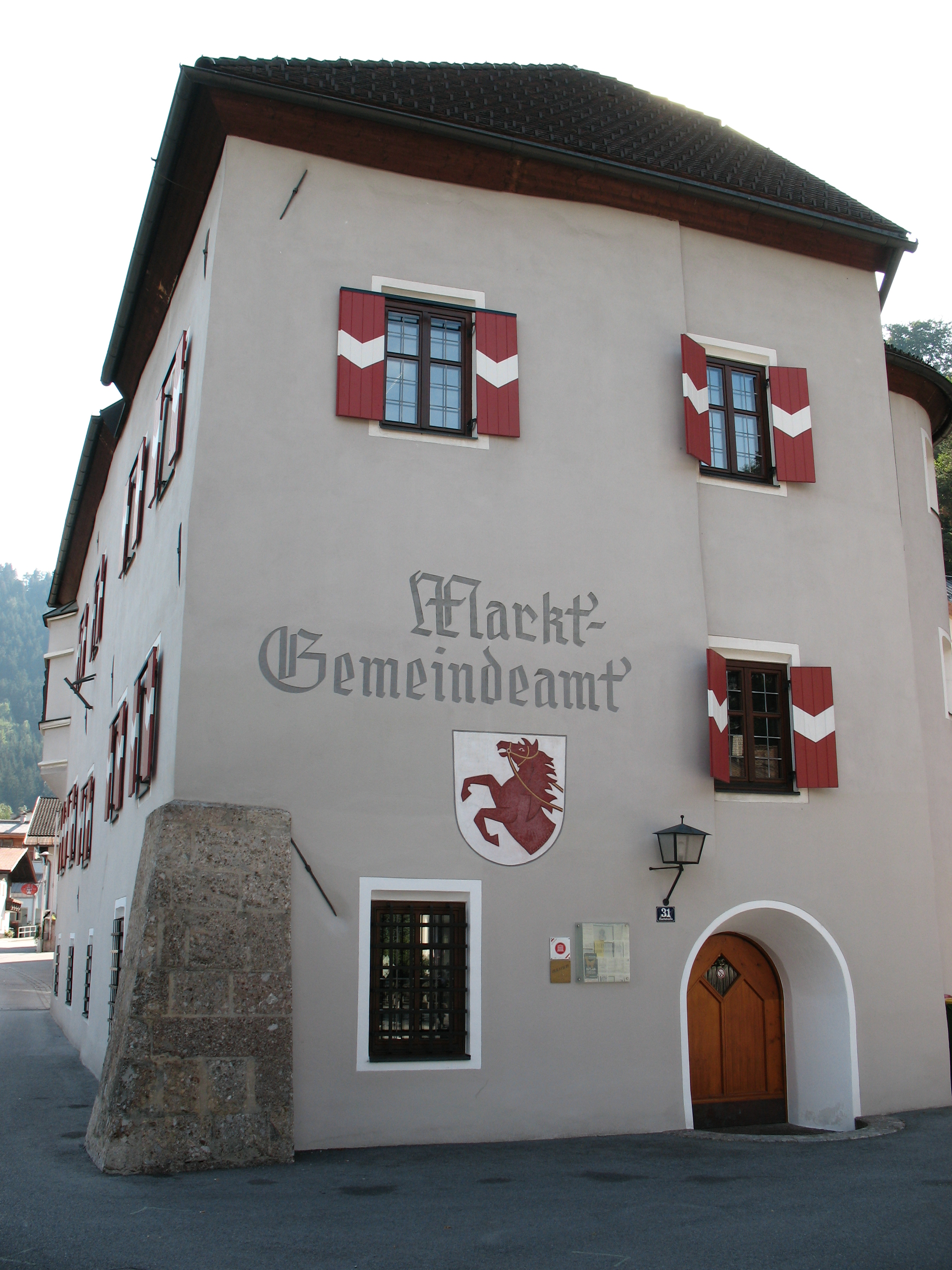 Gemeindeamt